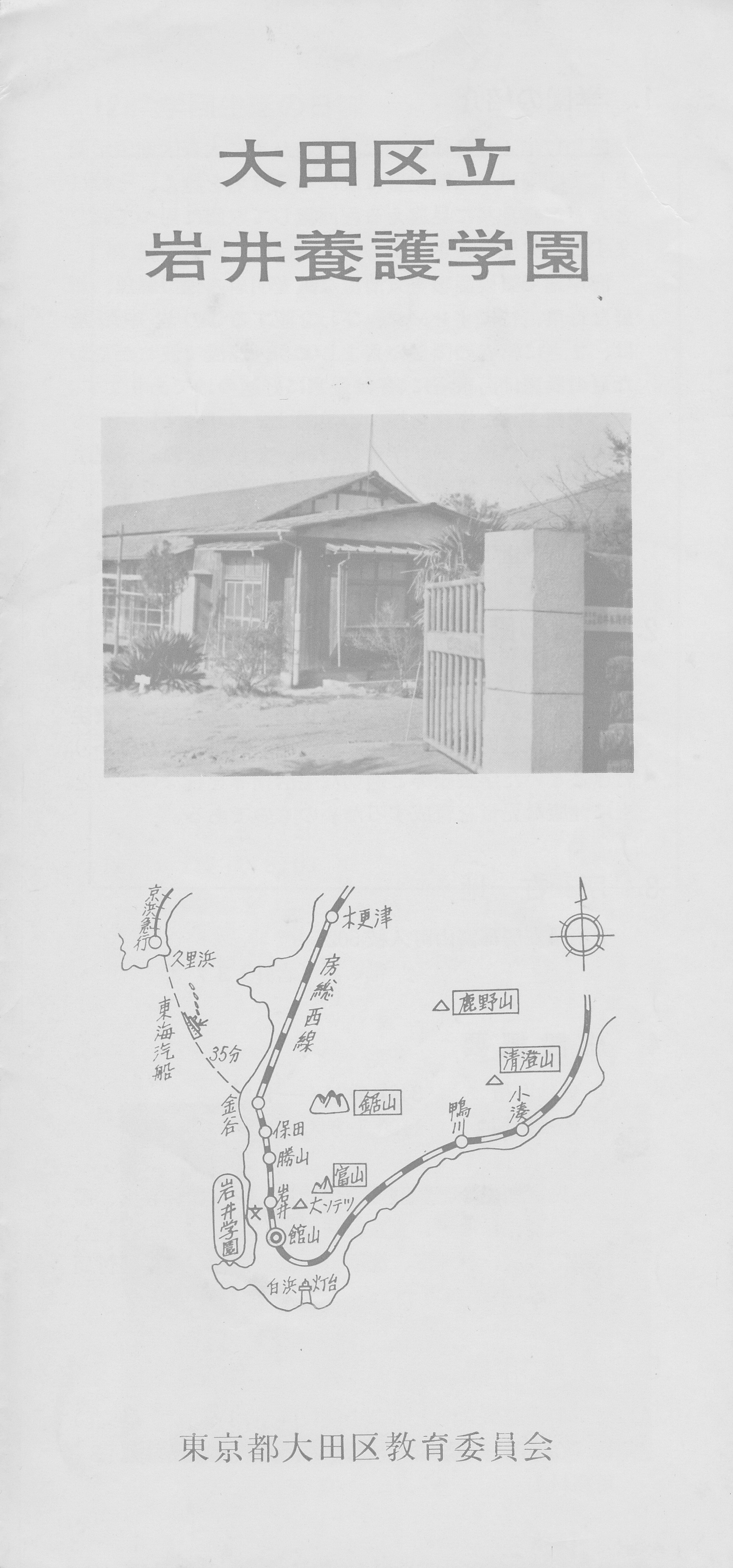 廃園となった養護施設に関する入園案内パンフレット抜粋